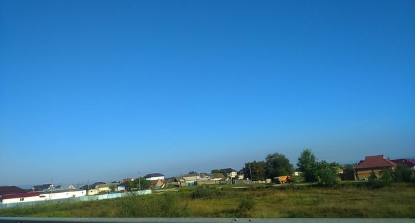 Вид на нижнюю окраину села Урвань Адыгэбзэ: Аруан къуажэм и ищIагъ къуажэкIэ